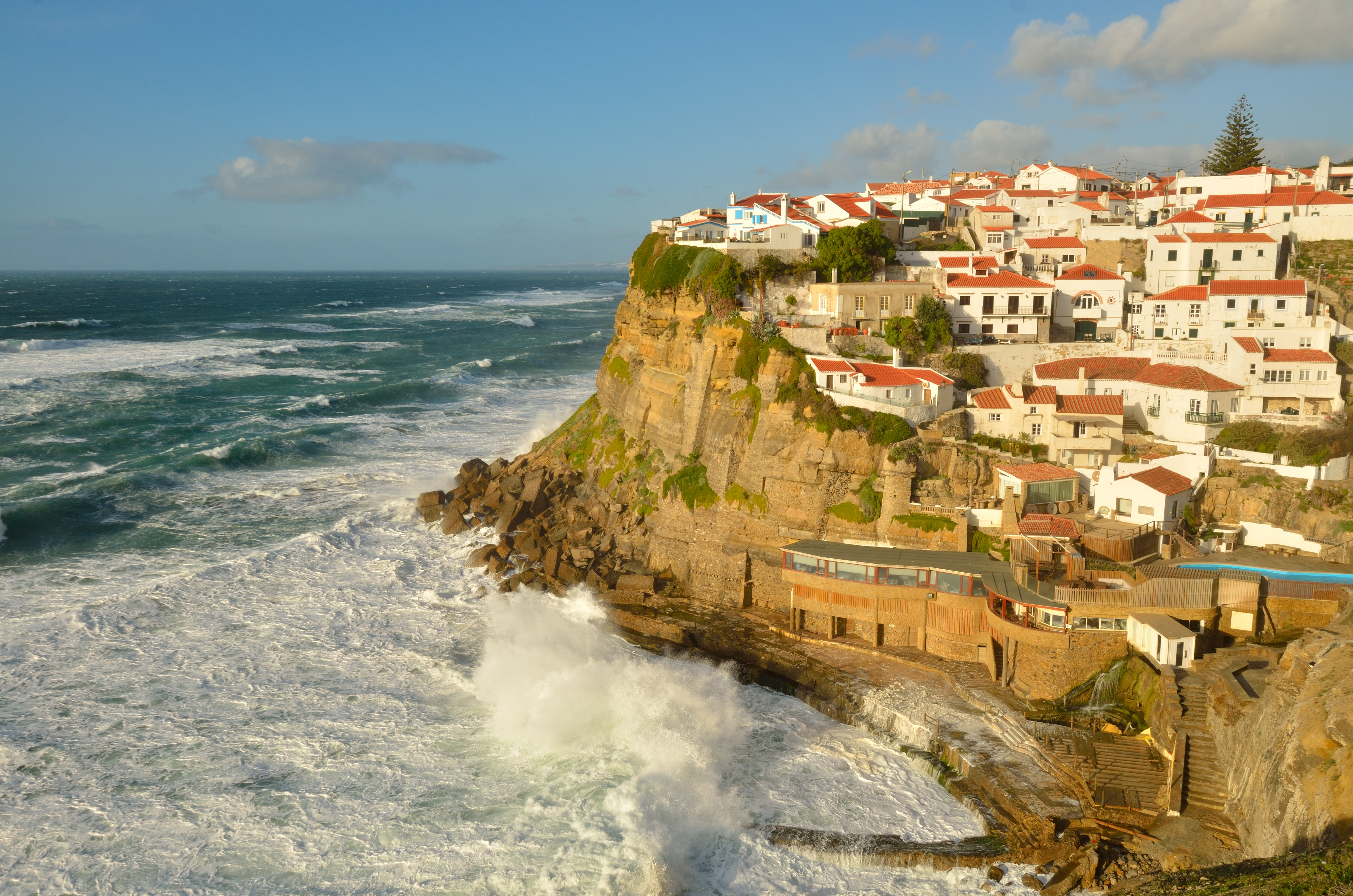 Vista elevada, sobre as Azenhas do Mar This is a photography of a Site of Community Importance in Portugal with the ID: PTCON0008. Natura2000 entry, EEA entry